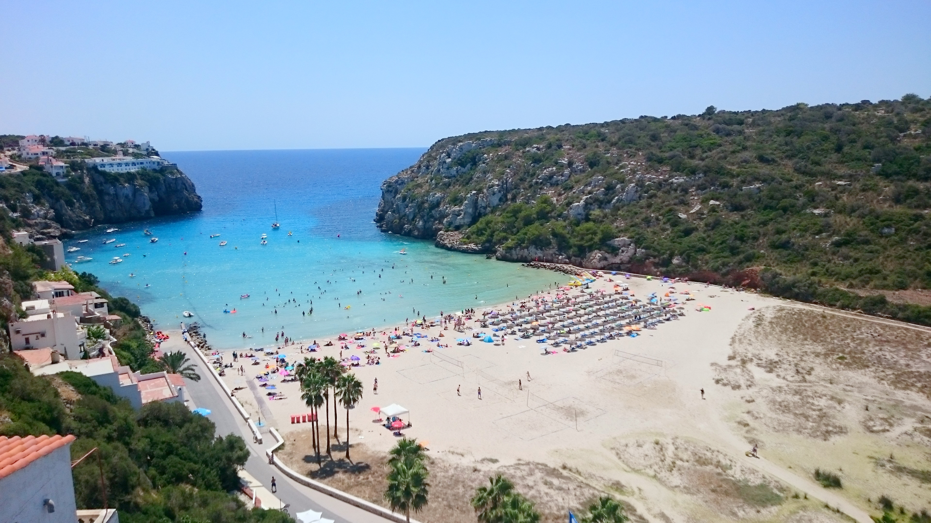 Vista de la playa de Cala en Porter This is a photography of a Special Area of Conservation in Spain with the ID: ES0000237. Natura2000 entry, EEA entry